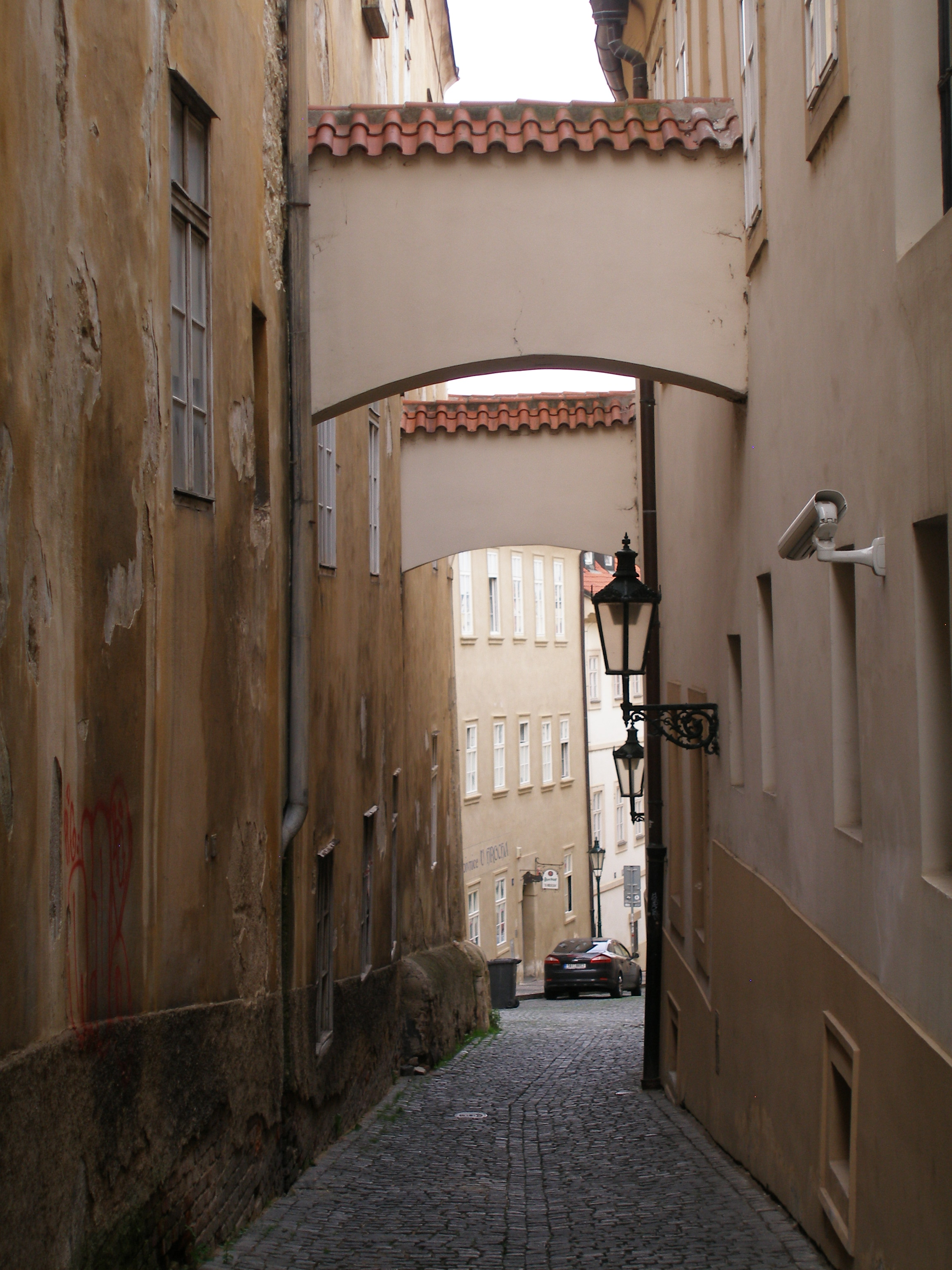 Thunovská ulice v Praze.